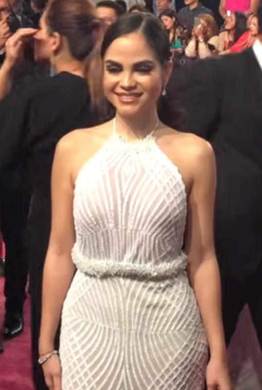 Natti Natasha en Premio Lo Nuestro 2016